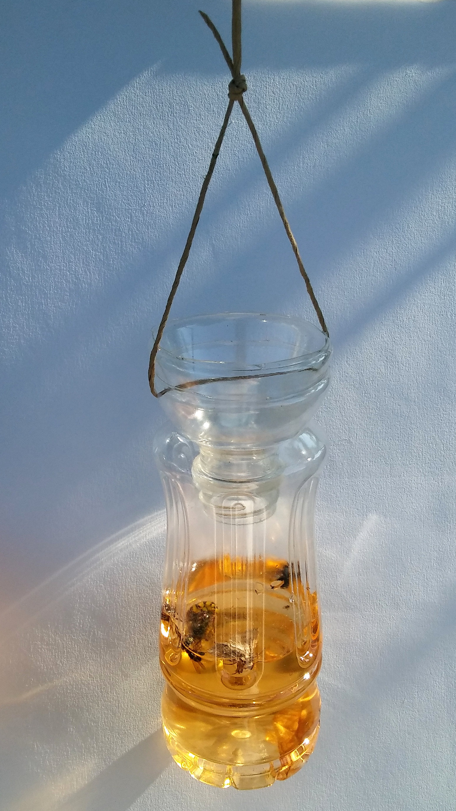 Szerszeń w wiszącej pułapce zrobionej z plastikowej butelki, sznurka papierowego i białego wina (zazwyczaj używa się piwa).